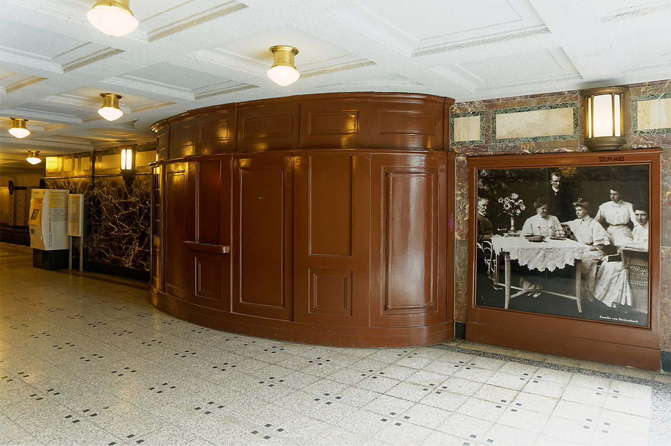 Nordeingang, Vorhalle mit einem Bild der Familie von Breitenbach des U-Bahnhofs Breitenbachplatz der Berliner U-Bahnlinie U3. in Berlin-Dahlem an der Grenze zu Wilmersdorf. Die nördliche Vorhalle mit dem Schalter ist eine Rekonstruktion, da diese im 2. Weltkrieg zerstört wurede und zunächst nur einfach aufgebaut wurde. Die Vorhalle ist fast identisch mit der südlichen Vorhalle, die jedoch mit einem anderen Bild ausgestattet ist. Dies ist der südlichste unterirdische Bahnhof der Kleinprofil-Linie U3. Die Linie wurde 1913 bis zu dieser Station in Betrieb genommen. Auch die nördlichen Bahnhöfe auf der Linie U3 sind sehenswert, da die damalige noch selbständige Stadt Wilmersdorf ihren Reichtum zur Schau stellen wollte.